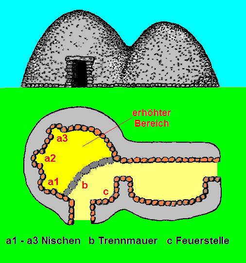 Kuppelbau der Hebriden